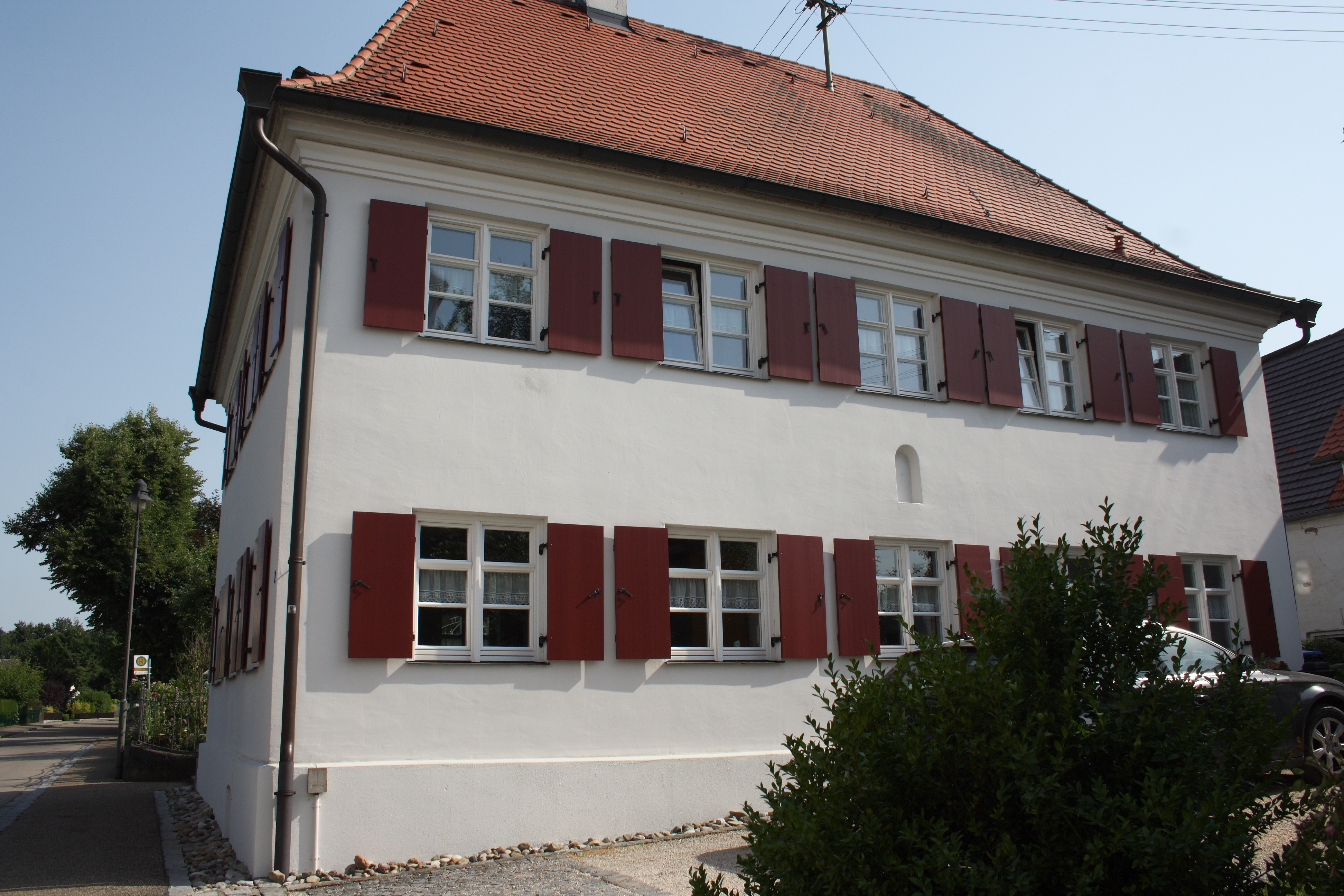 Pfarrhaus in Oxenbronn, einem Stadtteil von Ichenhausen im Landkreis Günzburg (Bayern), Ignaz-Rucker-Straße 2, um 1768 von Joseph Dosenberger d.J. erbaut